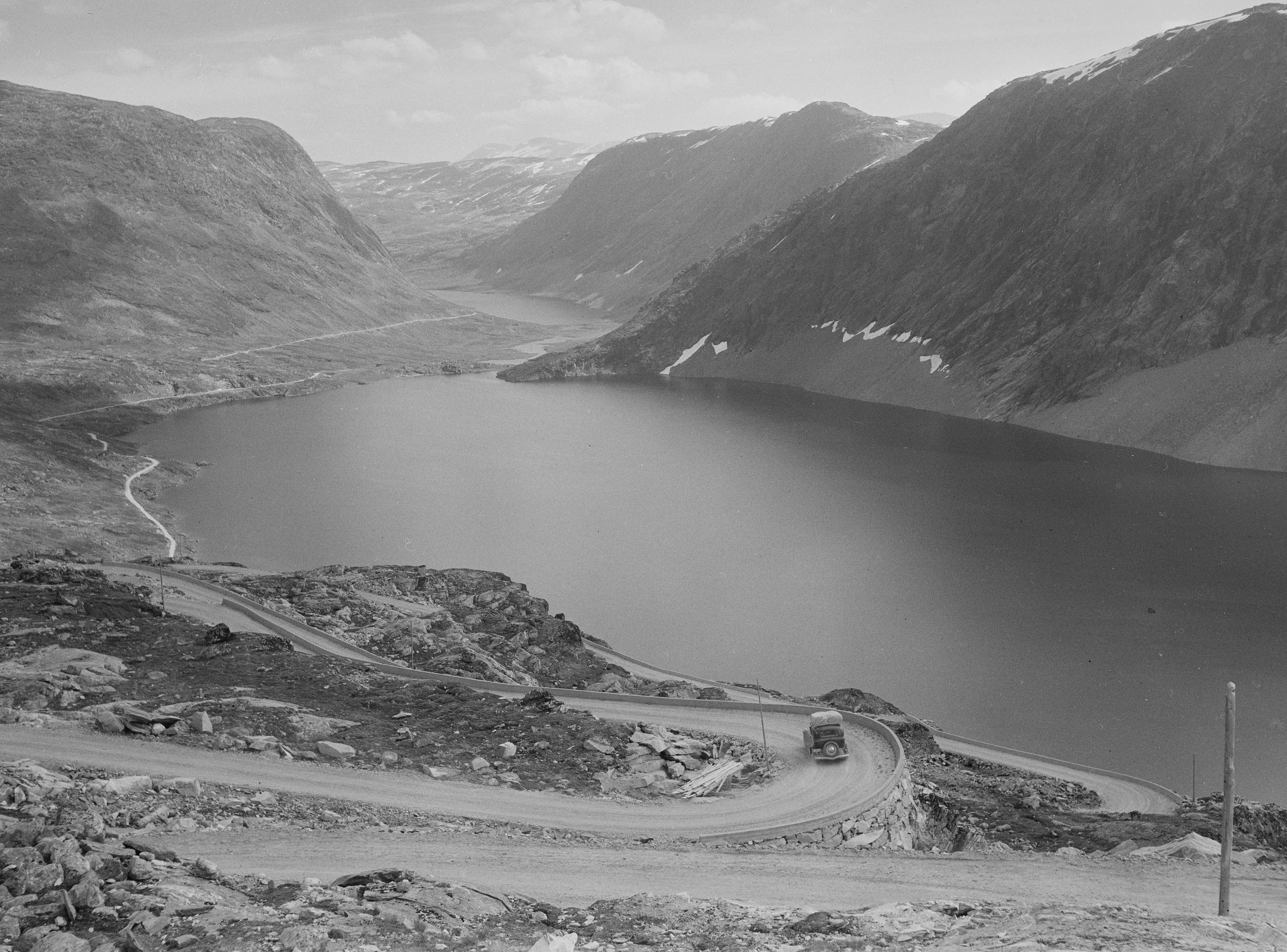 Bildet er hentet fra Nasjonalbibliotekets bildesamling. Anmerkninger til bildet var: Fotograf : ukjent Dalsnibba,Djupvatnet, Stranda, Møre og Romsdal